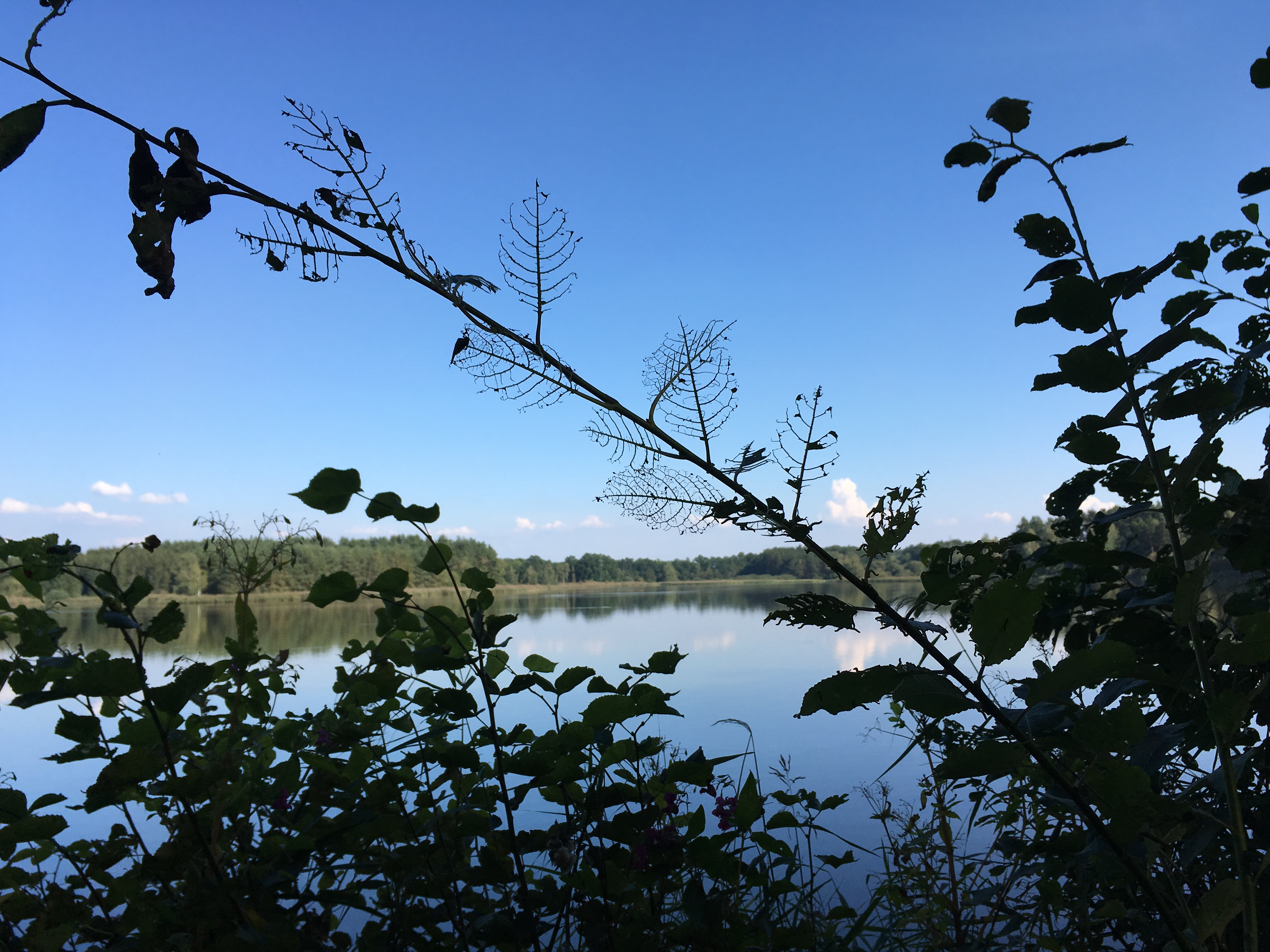 Starý u Soběslavi